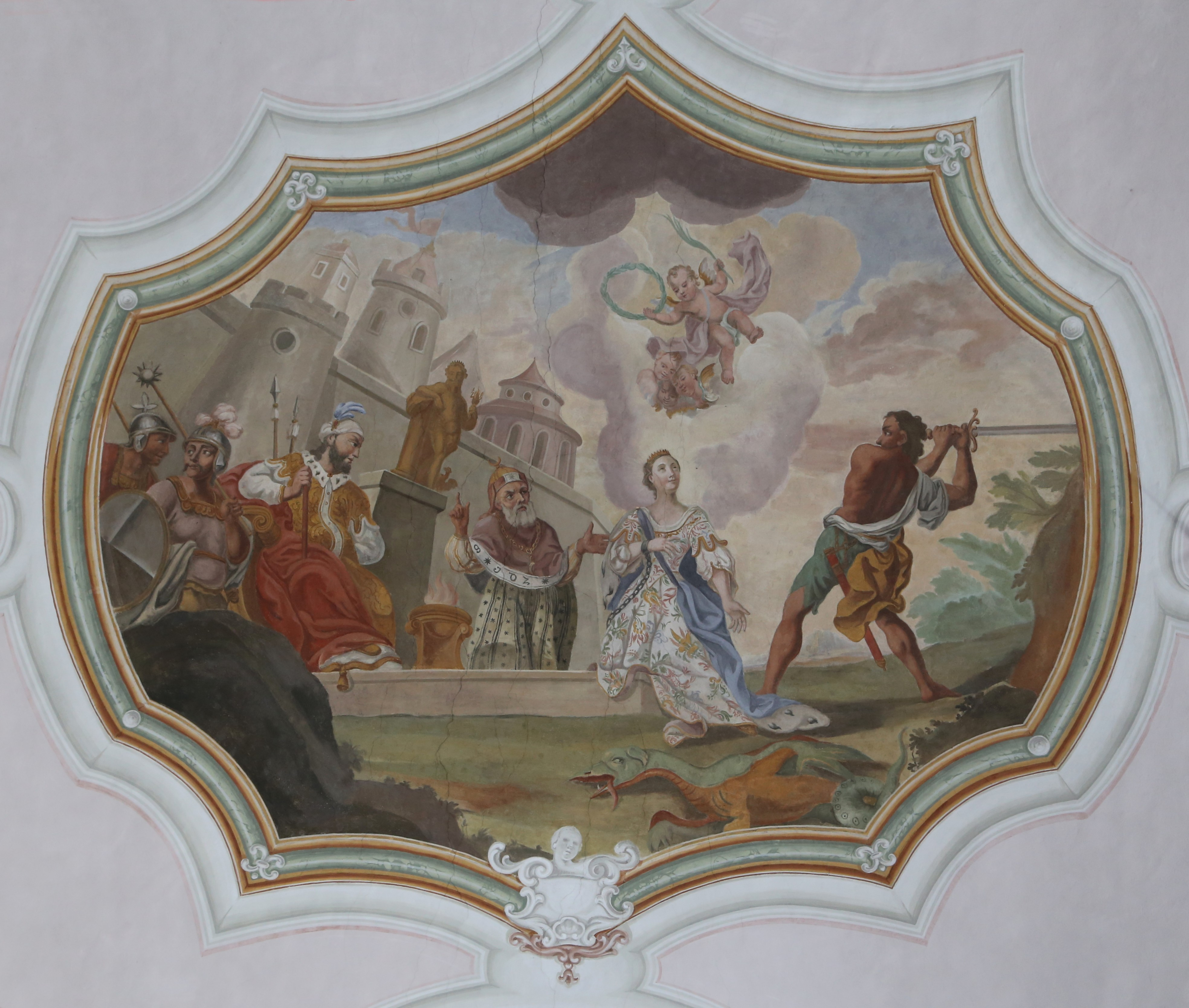 Kirchgasse, Niederndorf; Kath. Pfarrkirche hl. Georg und Friedhof This media shows the remarkable cultural object in the Austrian state of Tyrol listed by the Tyrolean Art Cadastre with the ID 3744. (on tirisMaps, pdf, more images on Commons)